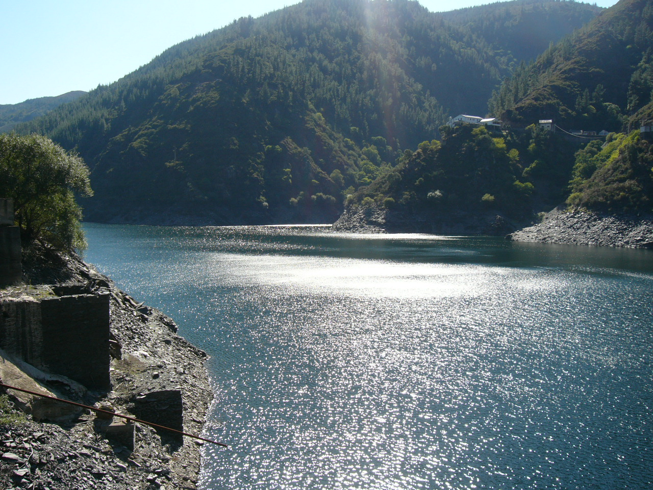 Embalse de Salime (Grandas de Salime - Asturias - Spain)